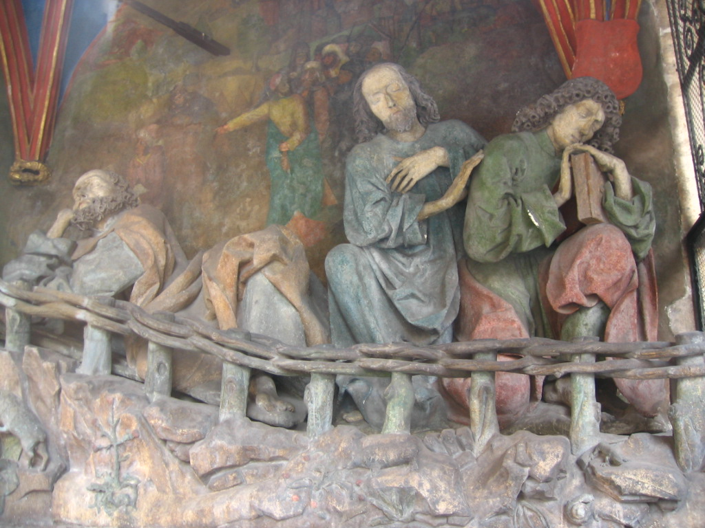 Wnetrze kaplicy cmentarnej zwanej "Ogrojec" przy kosciele Sw. Barbary w Krakowie